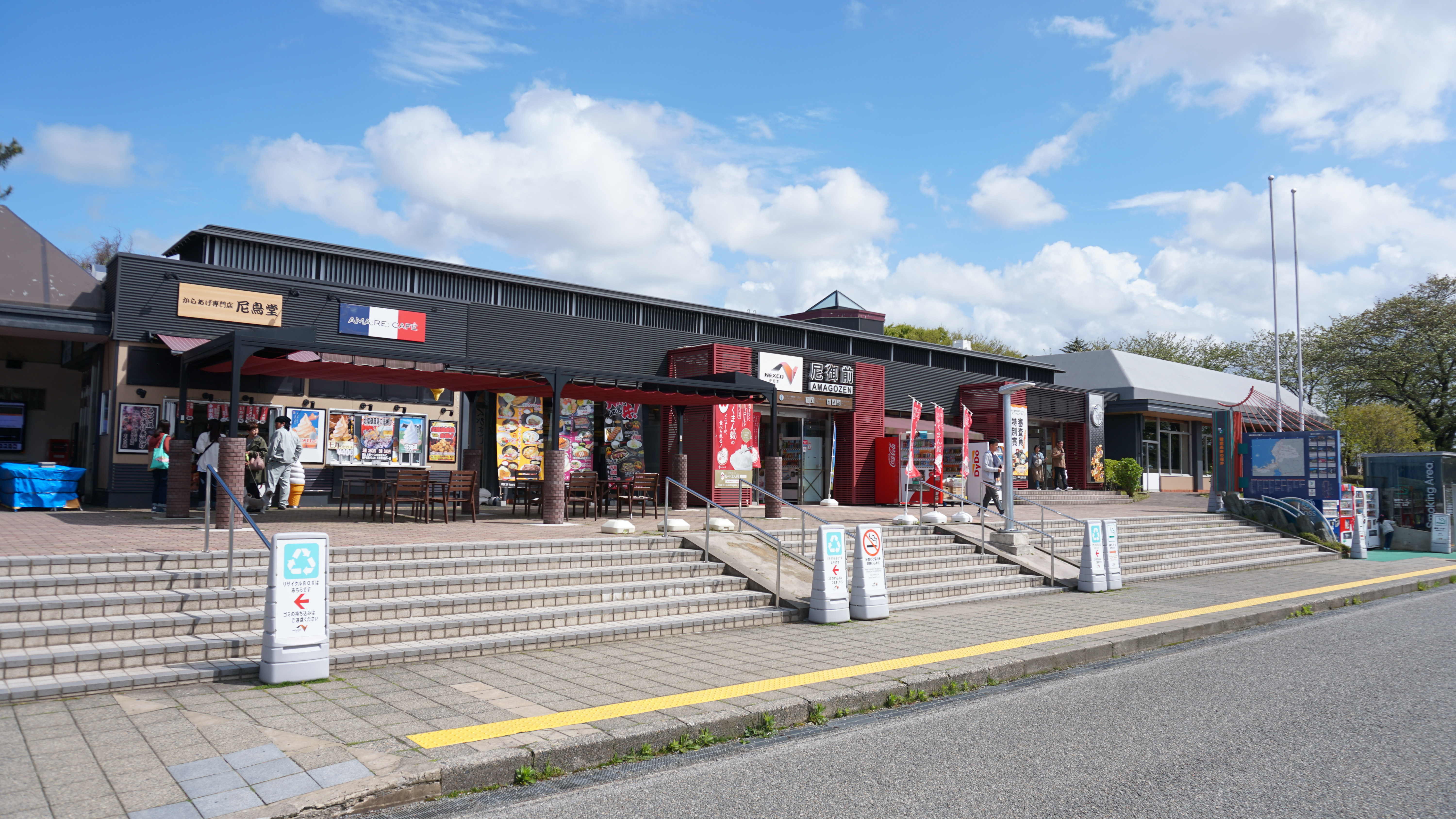 北陸自動車道・尼御前サービスエリア（石川県加賀市・上り線）